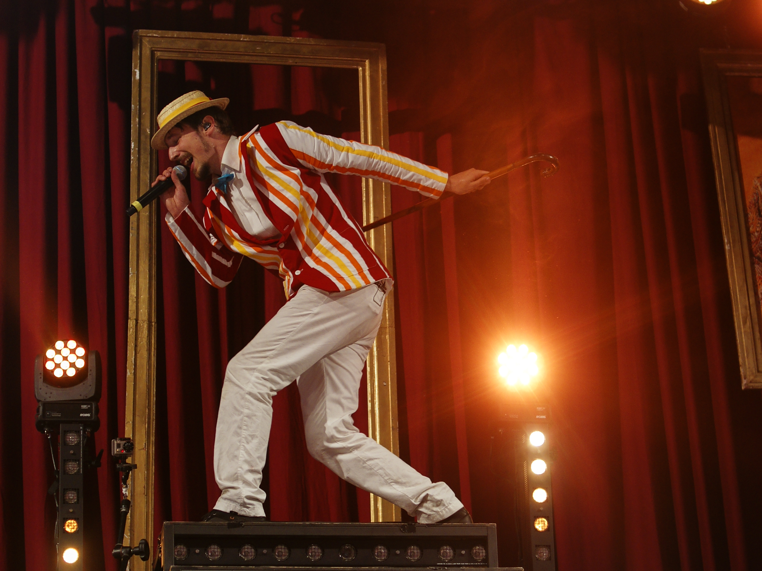 Deichbrand-Festival 2014 Seeflughafen Nordholz / Cuxhaven Alligatoah im Palastzelt